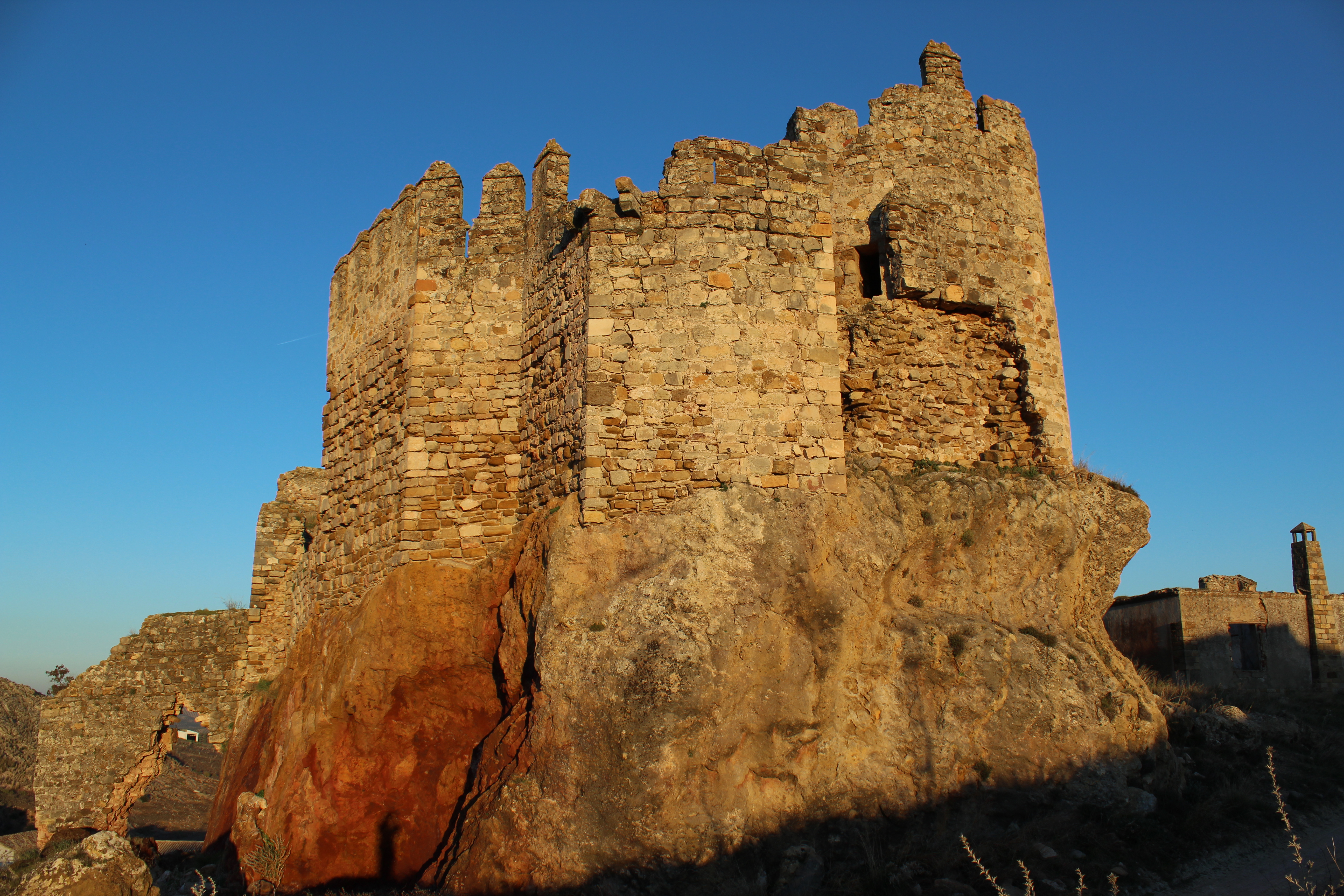 Esquina suroccidental del castillo del Berrueco.